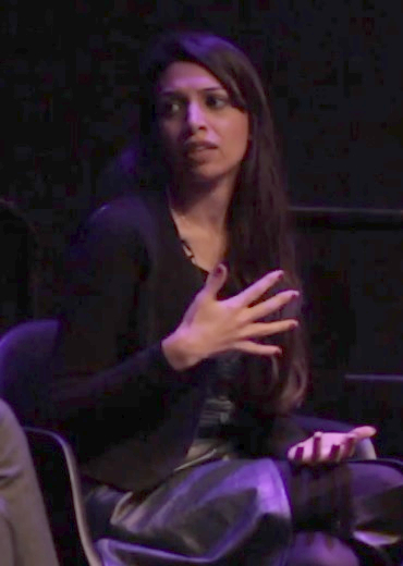 The Meaning 2016 panel was hosted by Paul Mason and included the co-leader of The Green Party Jonathan Bartley, director of the Centre of Labour and Social Studies Faiza Shaheen, leadership consultant Blaire Palmer and Paul Green Jr. — the founder of the Morning Star Self-Management Institute.